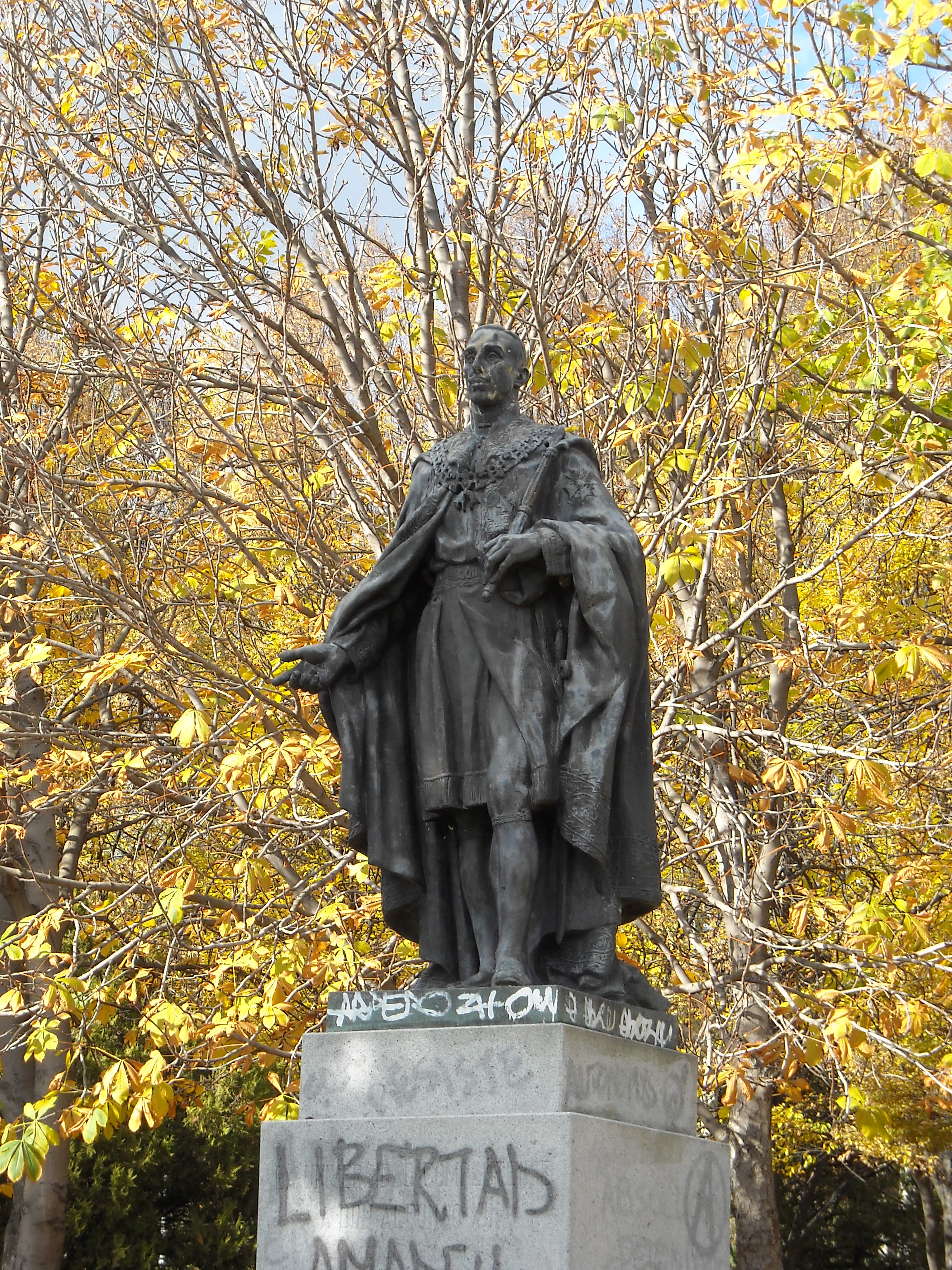 Estatua del Rey Alfonso XIII en el Paraninfo de la Universidad Complutense. Escultor: Fructuoso Orduna